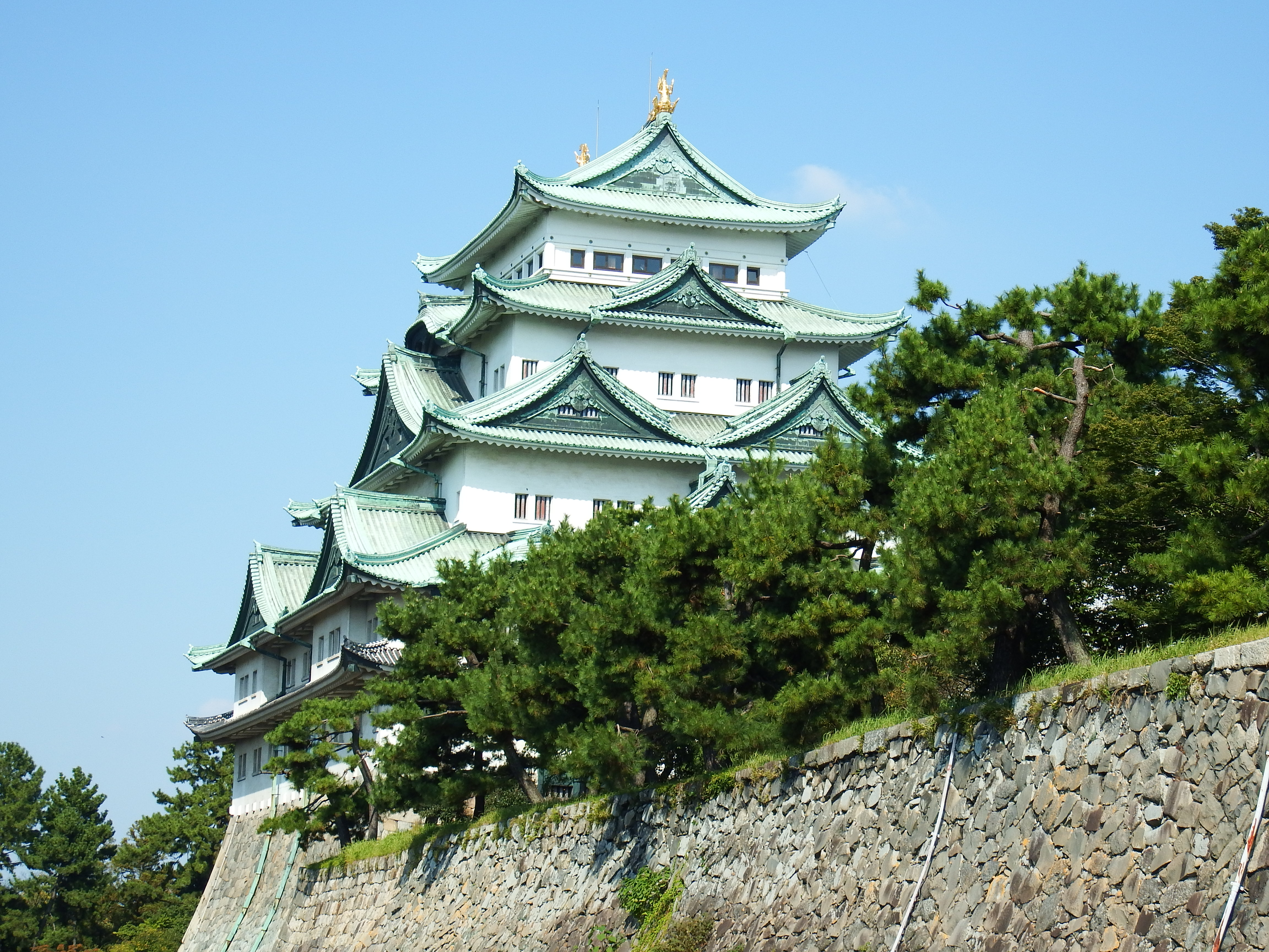 名古屋城天守